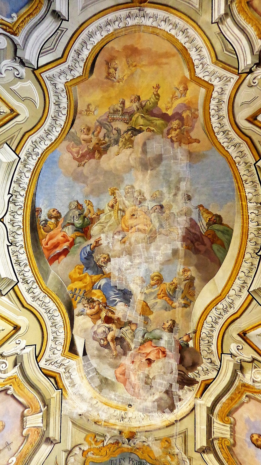 Affresco volta. Gloria di San Pietro di Guglielmo Borremans.